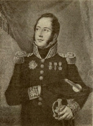 Louis Partouneaux (1770-1835), général de division et comte de l'Empire. Il capitule face aux Russes sur les rives de la Bérézina le 27 novembre 1812.